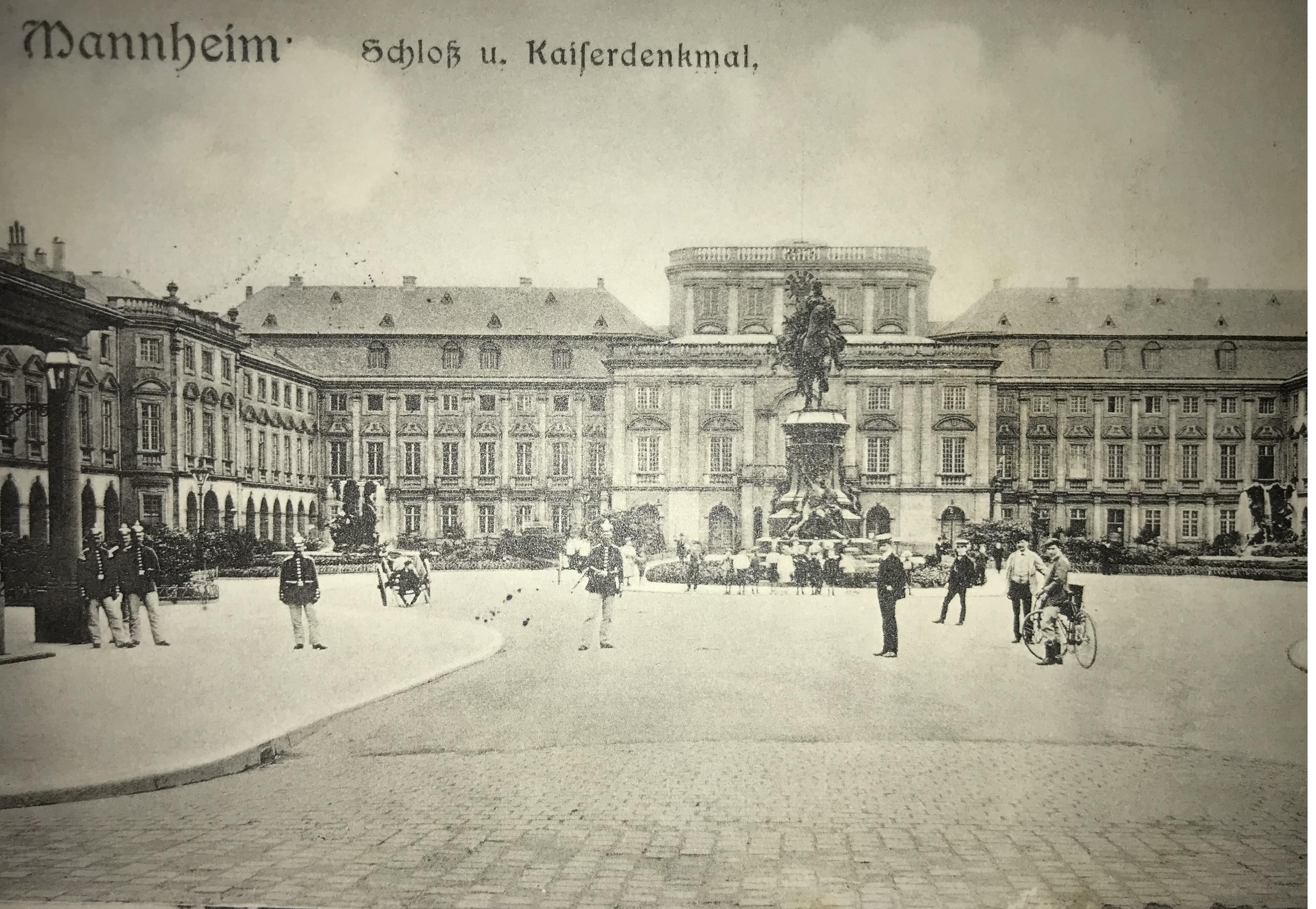 Schloss Manheim (1912 oder kurz davor), mit Kaiserdenkmal